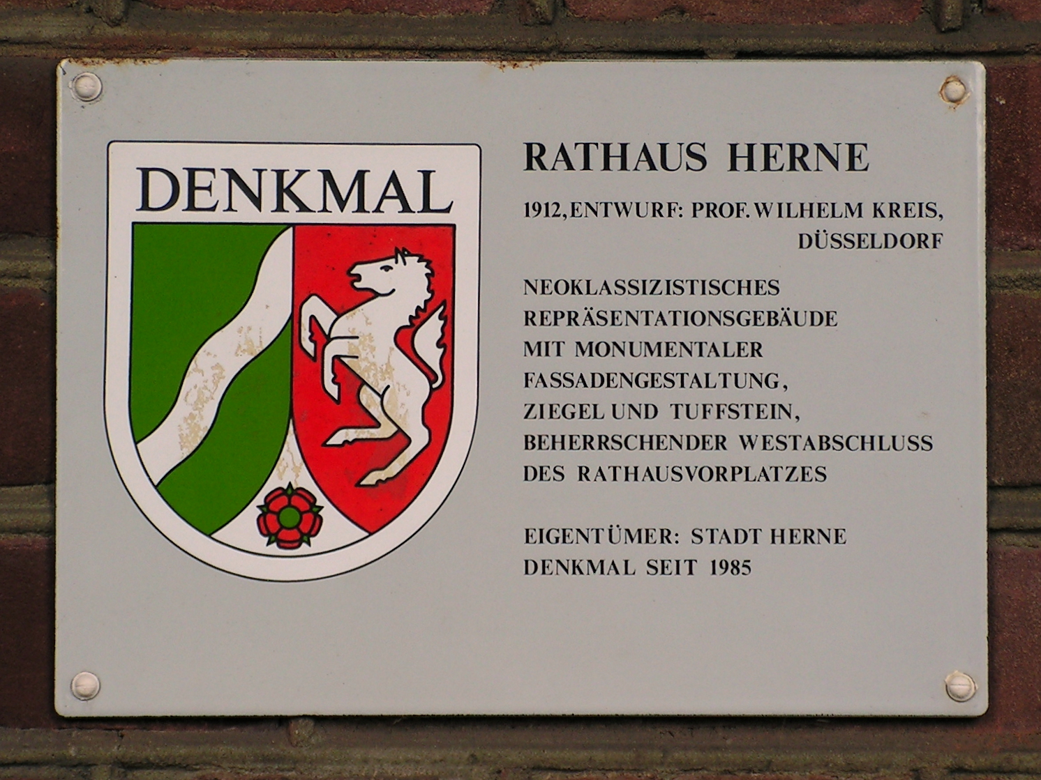 Denkmaltafel